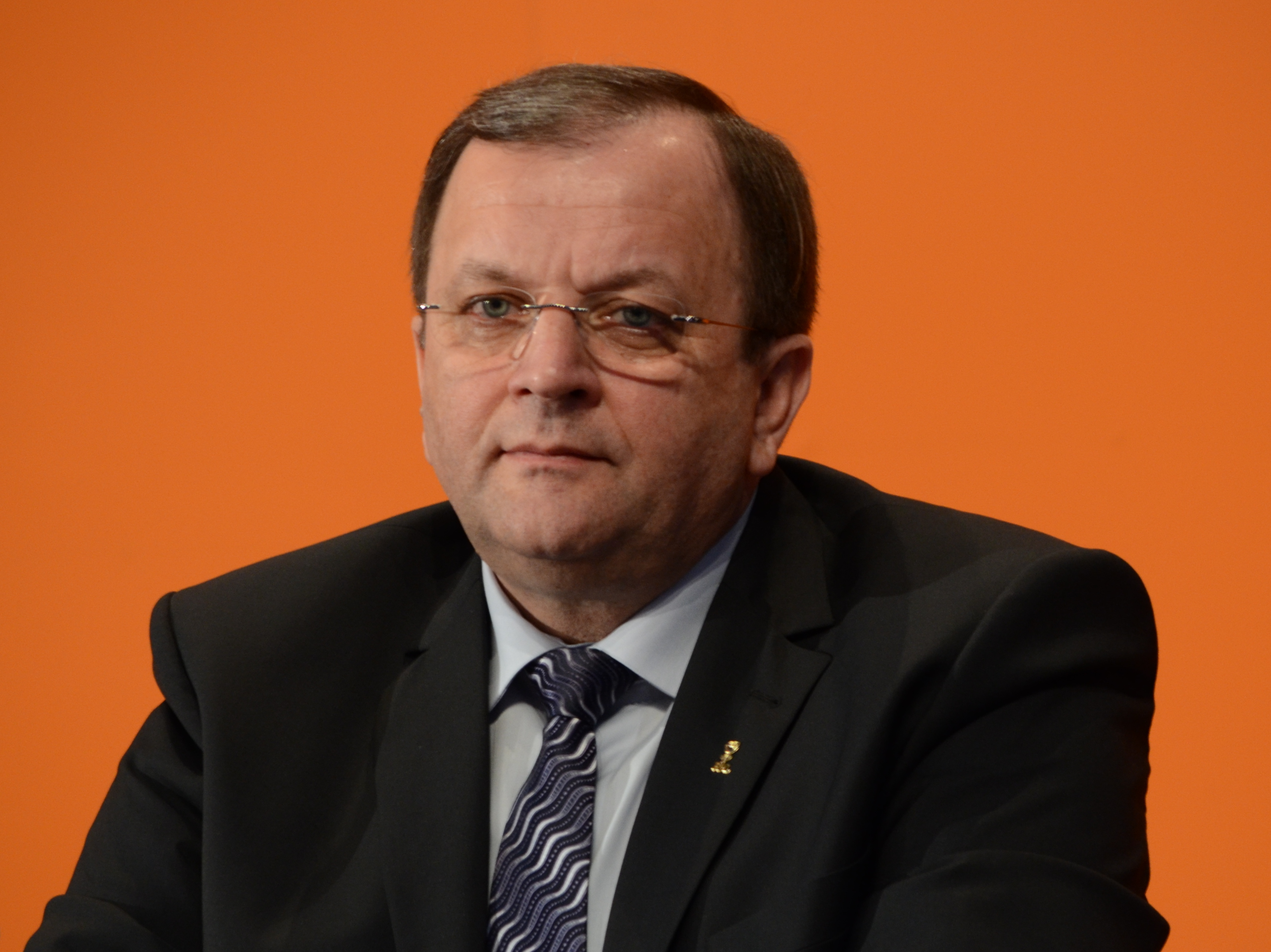 Gheorghe Flutur (la Convenția națională extraordinară a Partidului Democrat-Liberal, 23 martie 2013)